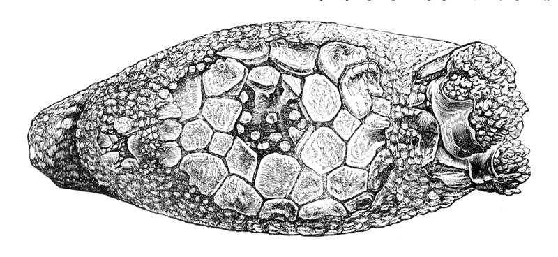 Psolus